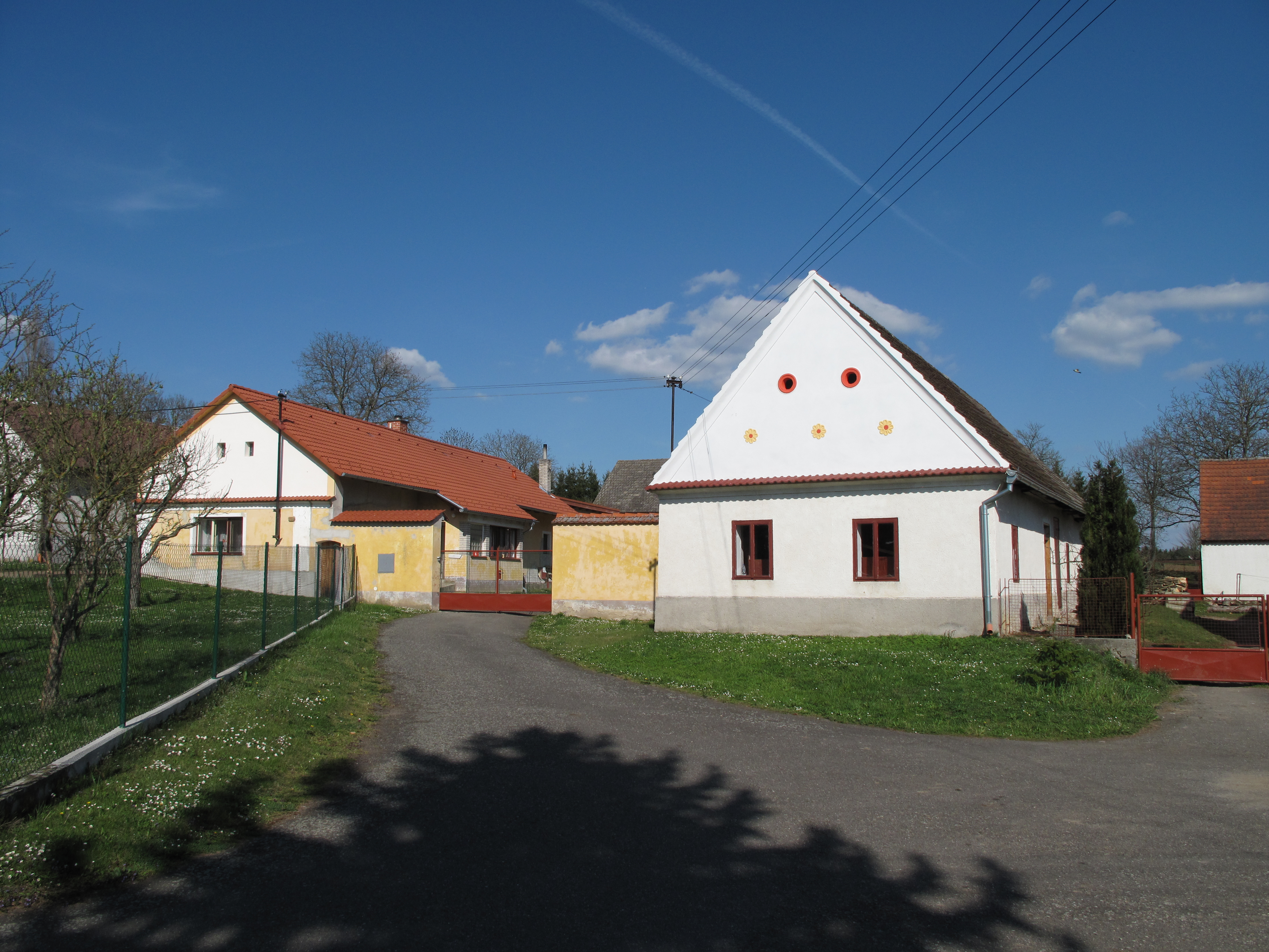 Domy v Předičích. Okres České Budějovice, Česká republika.